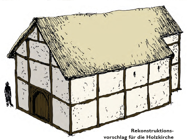 Rekonstruktionsvorschlag 1. Bauphase im 7. Jahrhundert